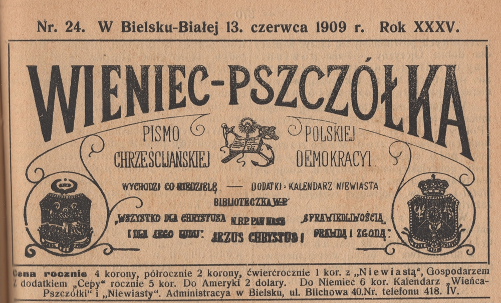 Czasopismo "Wieniec - Pszczółka". Organ Stronnictwa Chrześcijańsko-Ludowego, Bielsko, 1909 r. ze zbiorów Muzeum Historycznego w Bielsku-Białej